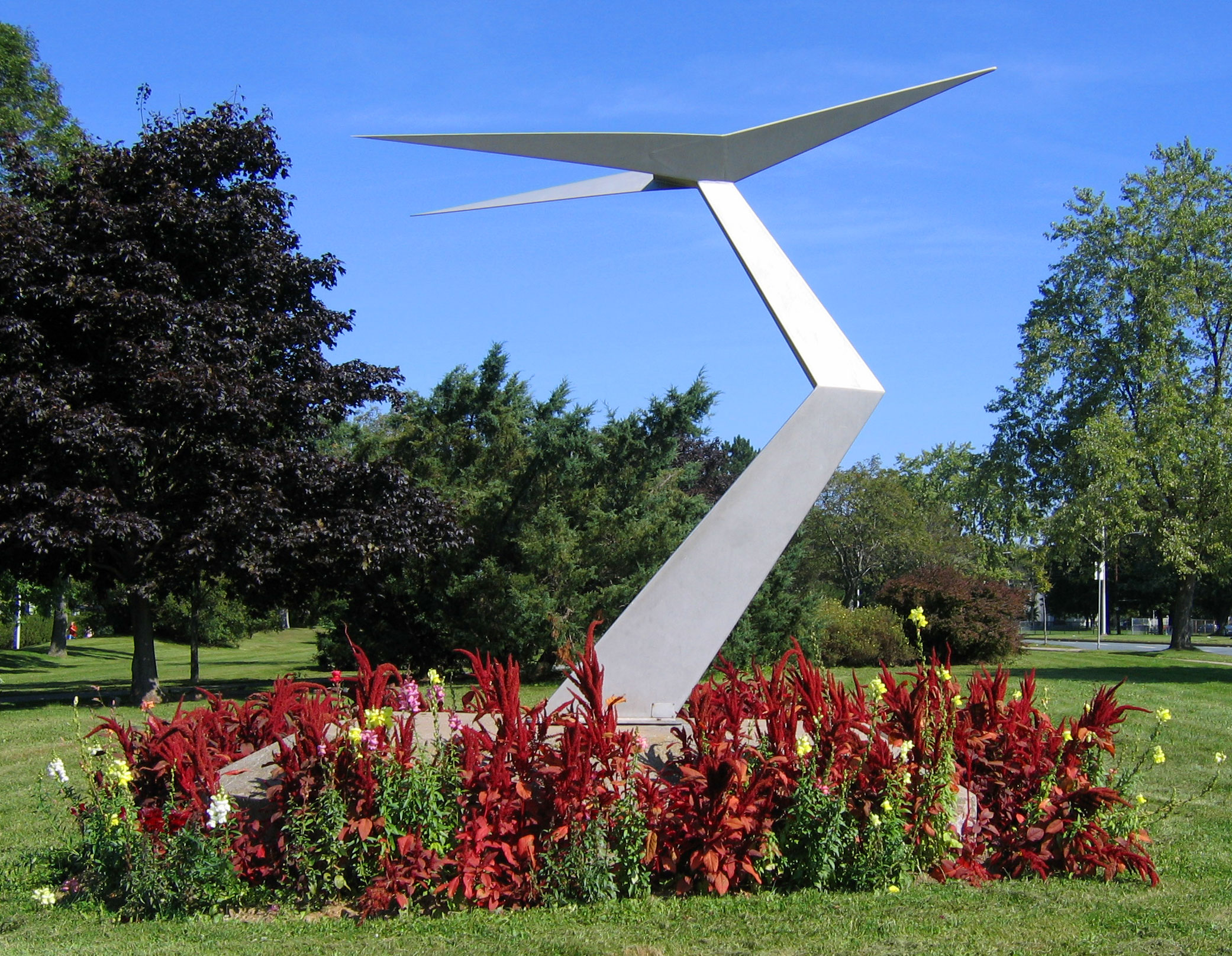 Saunders Park memorial